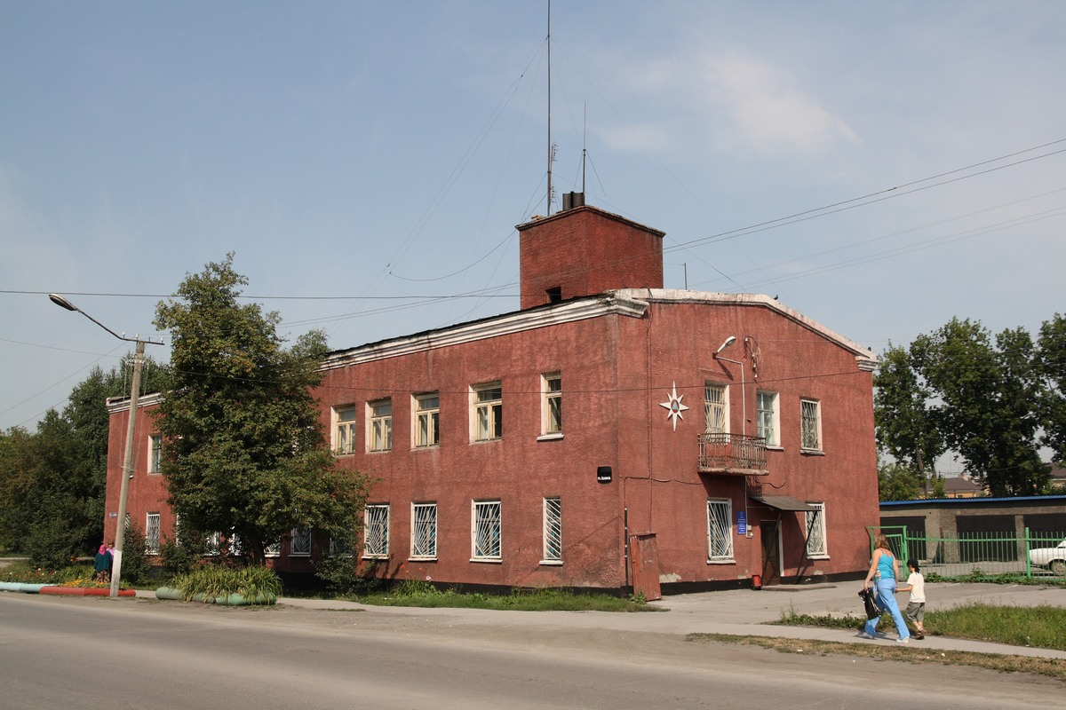 Guryevsk, Kemerovo Oblast, Russia